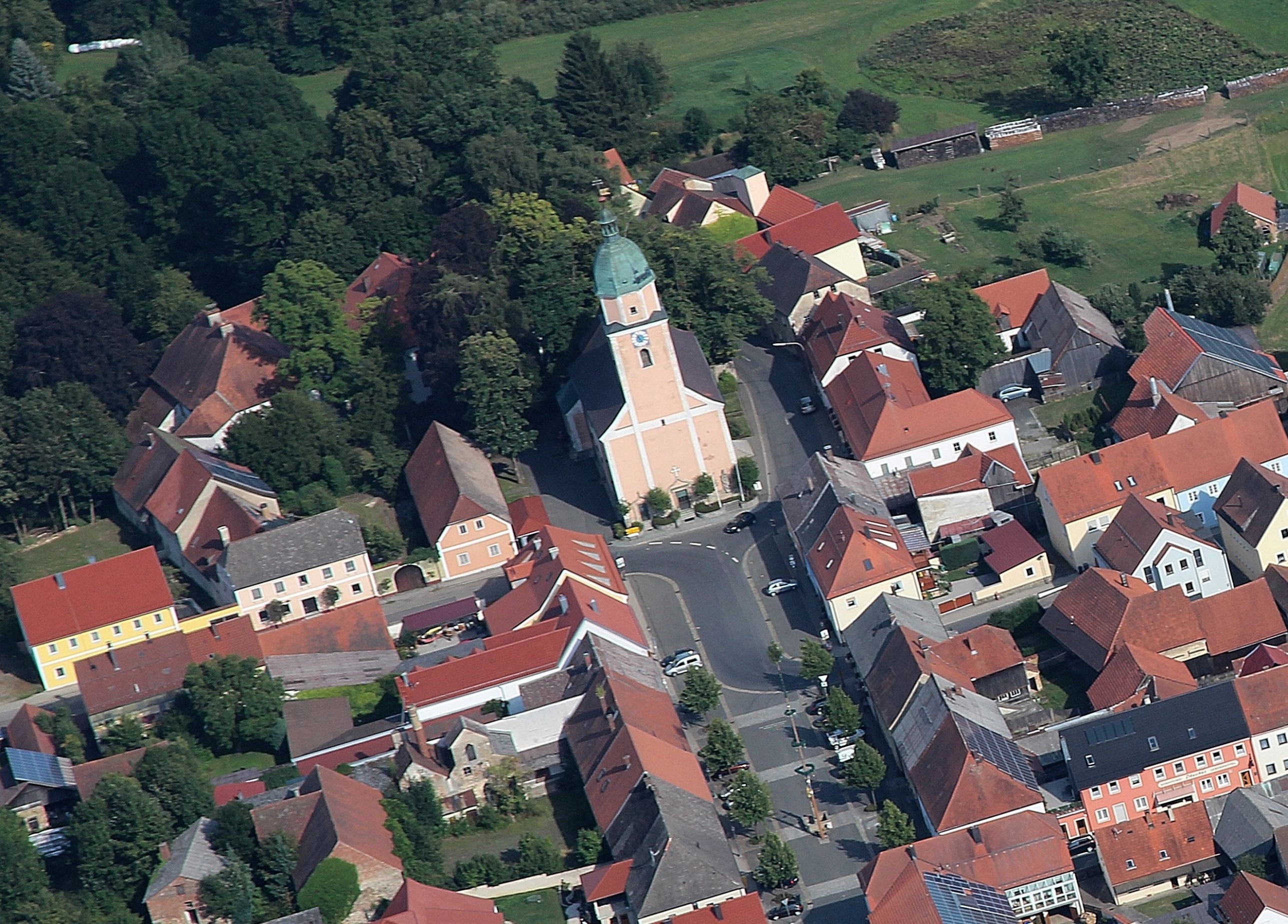 Katholische Pfarrkirche St. Andreas, links daneben das Schloss Winklarn; Markt Winklarn, Landkreis Schwandorf, Oberpfalz, Bayern